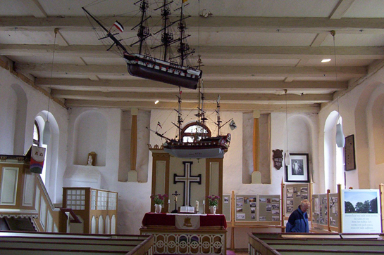 Saalkirche in Garz, Innenraum